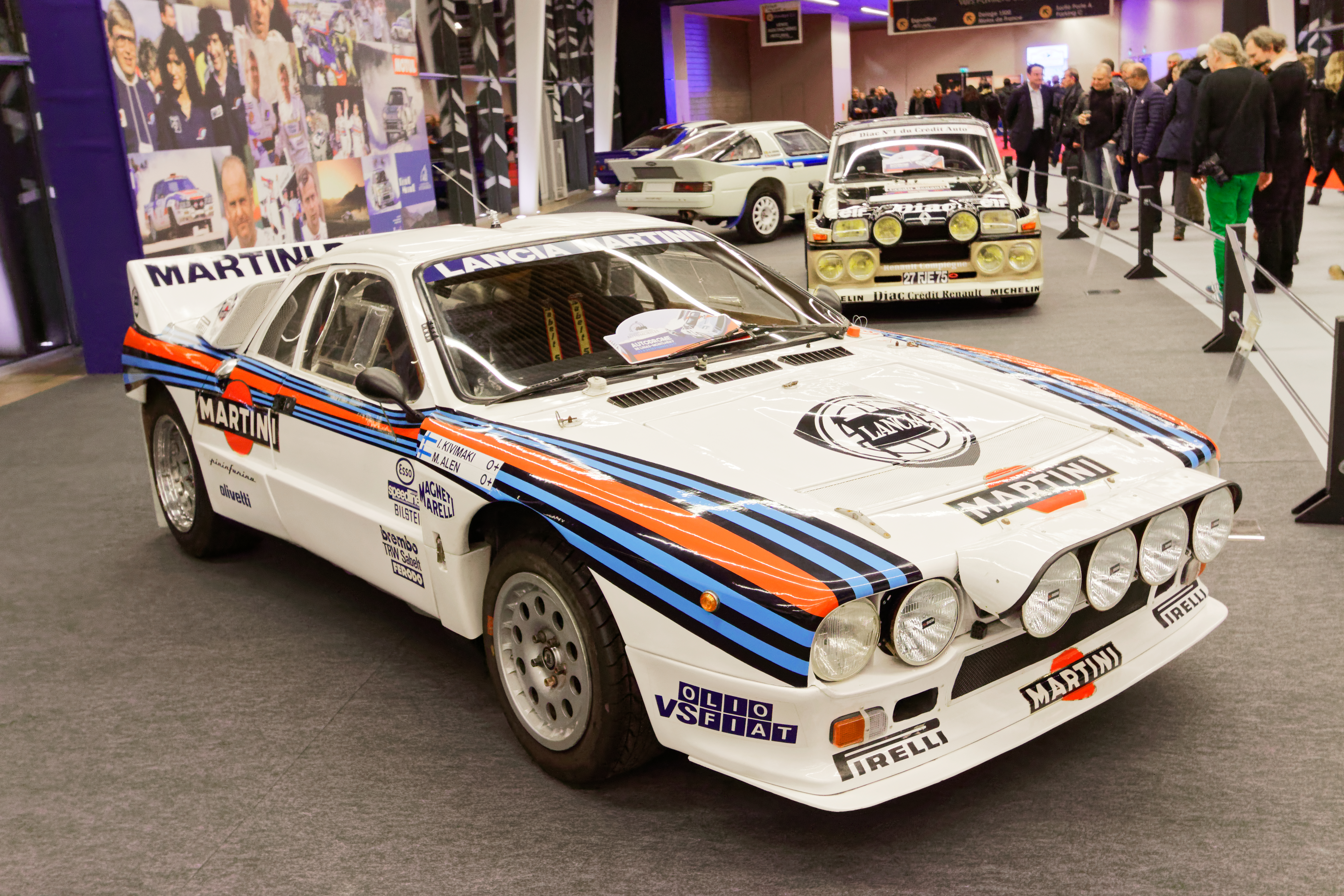 Une Lancia 037 exposée lors du salon Rétromobile 2017.